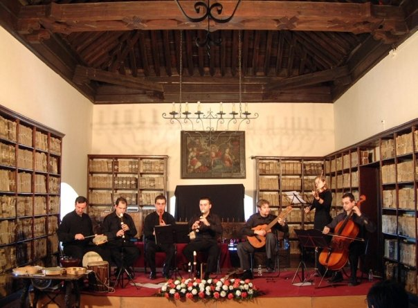 Concierto de Syntagma Musicum en el festival de música de Úbeda.